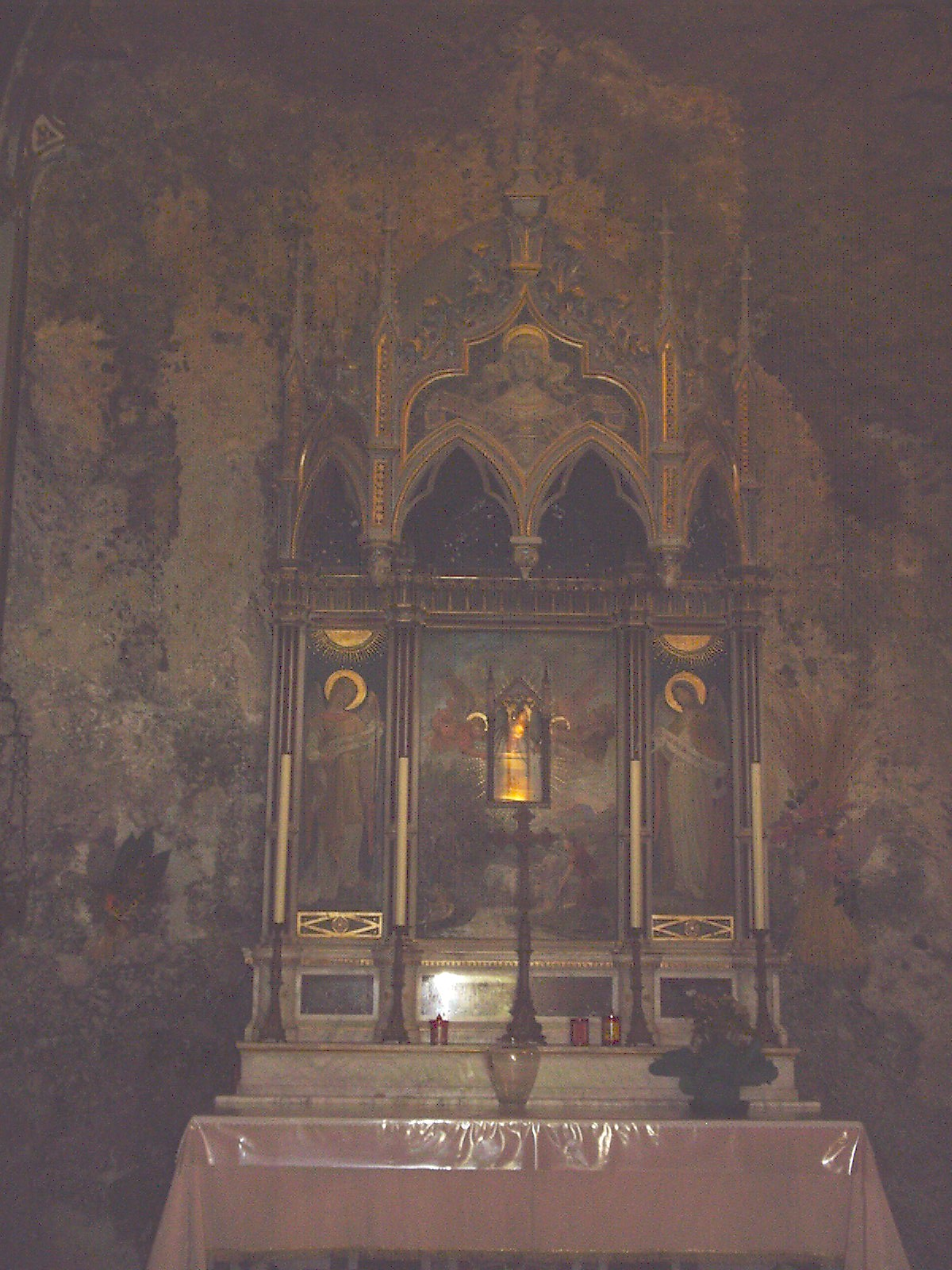 Altare della chiesa della Madonna del Lago (Scanno, L'Aquila)